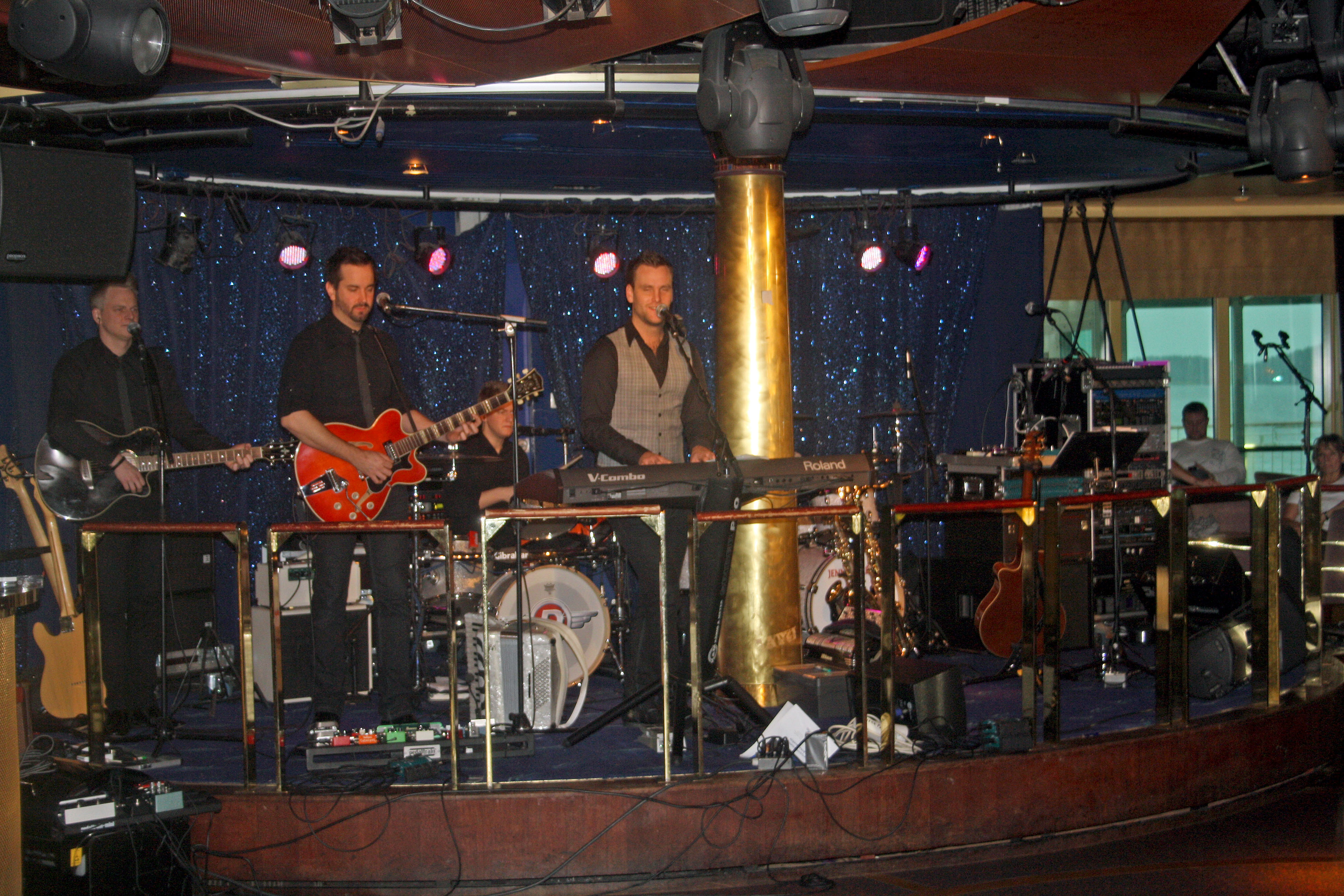 Dansbandet Mats Bergmans på Birka Paradise.